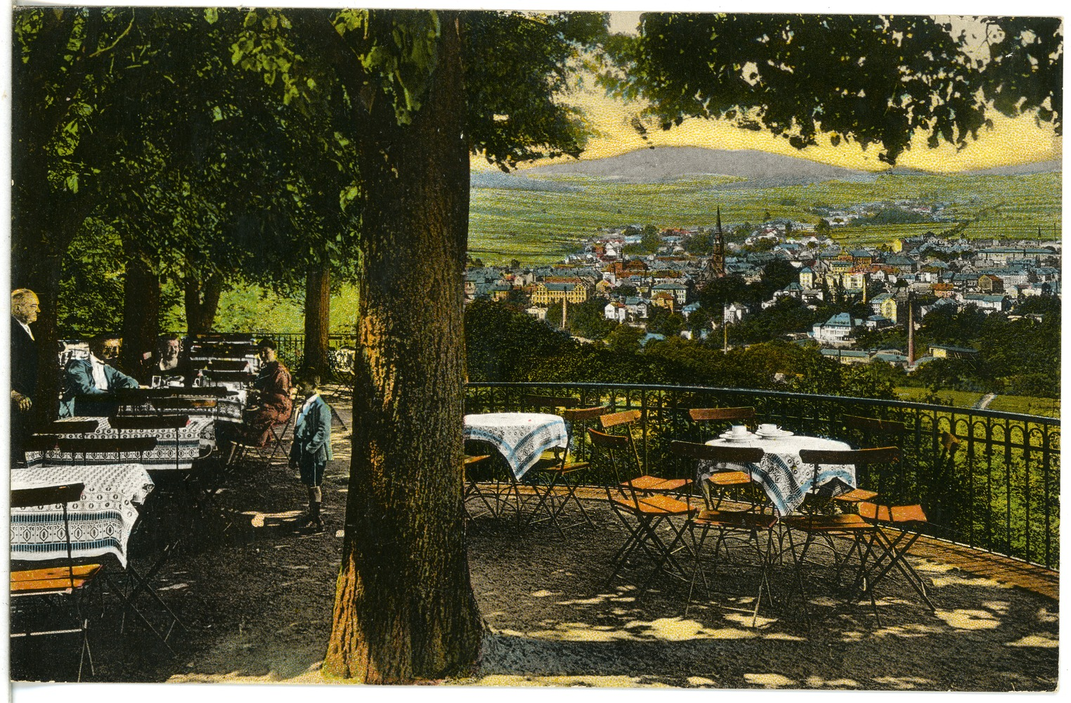 Löbau; Restaurant Honigbrunnen auf dem Löbauer Berg This postcard is from publisher Brück & Sohn in Meißen ( postcard has a unique number 23366 and is available in a higher resolution at the publisher. This images was uploaded in a cooperation project between Wikipedians and the publisher.